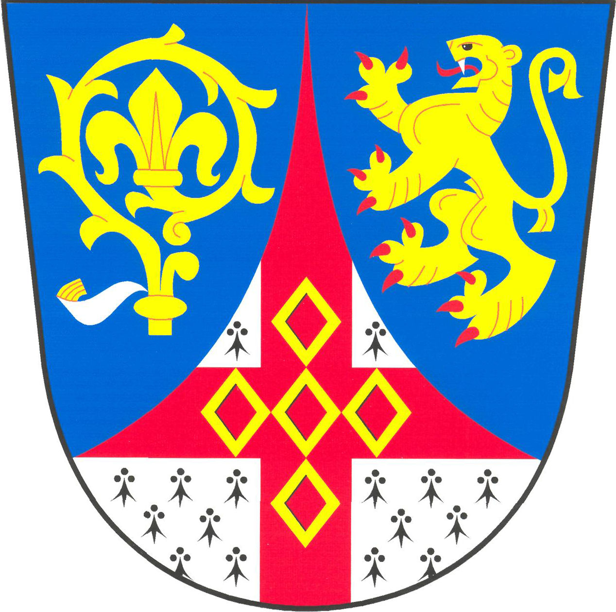 Znak obce Nebužely